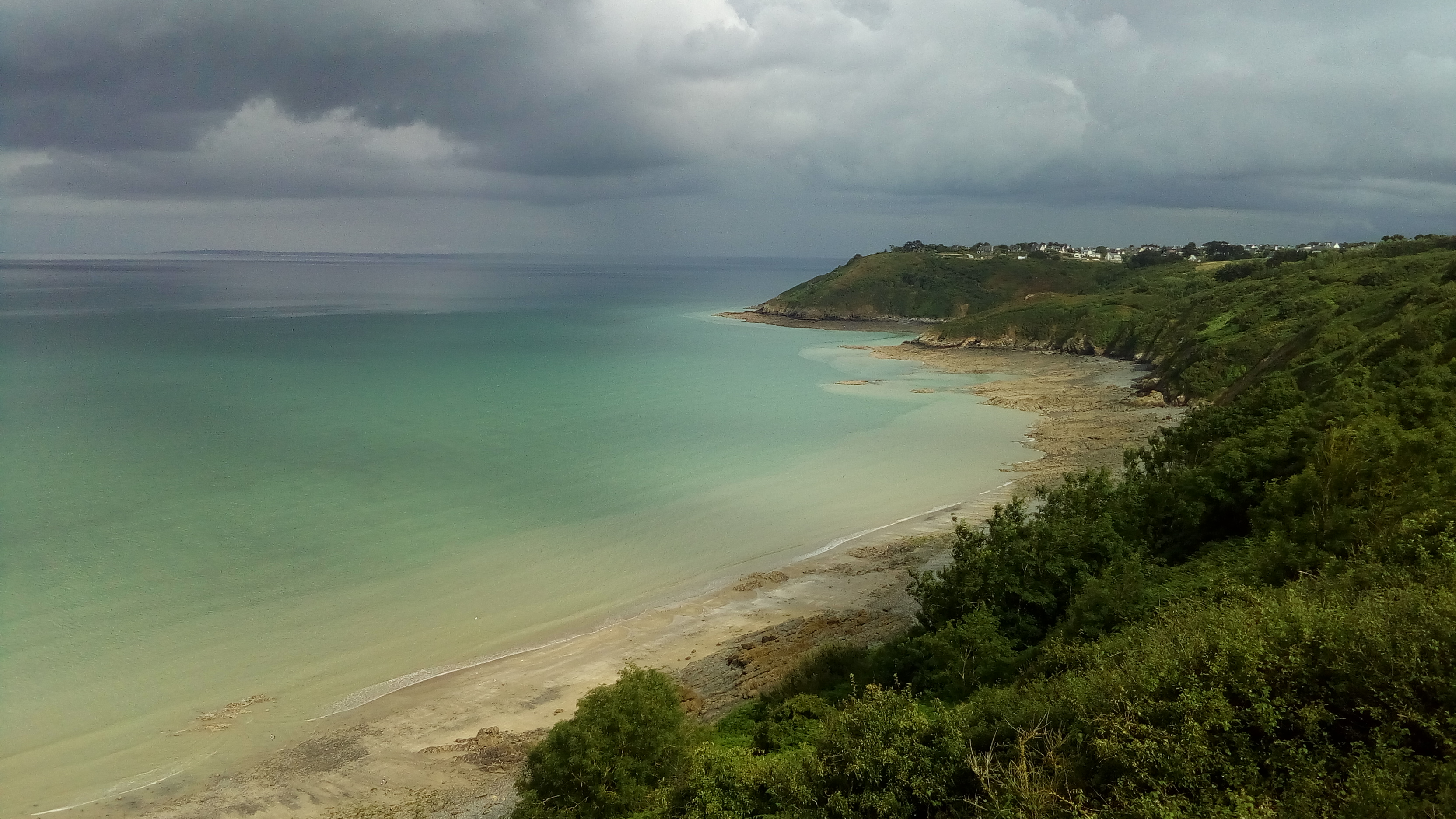 La plage de Port-Jéhan et la pointe de Pordic (Côtes d'Armor, France).